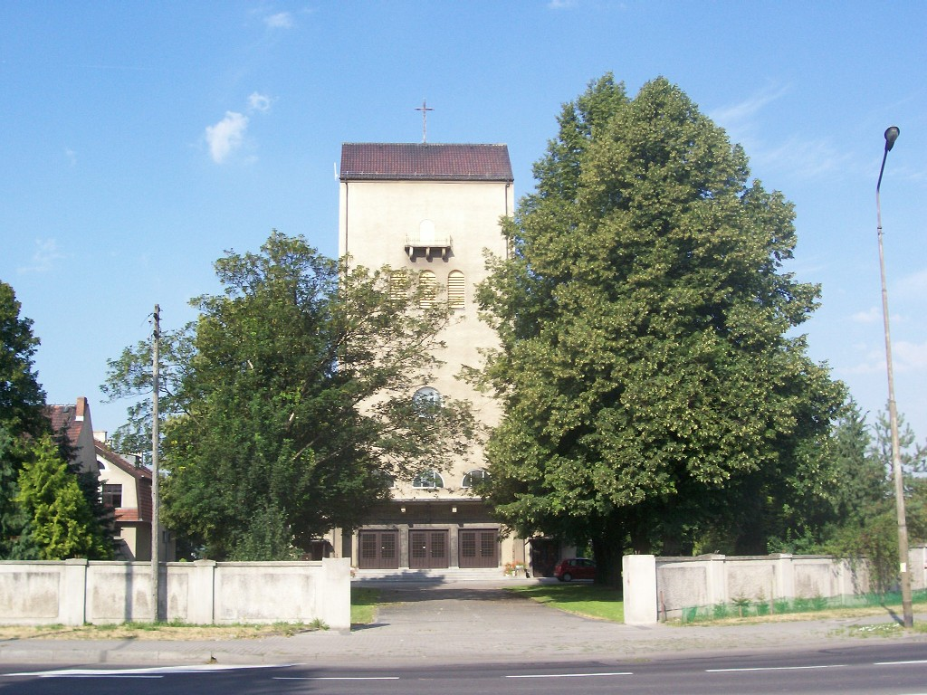 The church of St. Michael in Opole-Półwieś, Poland; Kościół św. Michała w Opolu-Półwsi